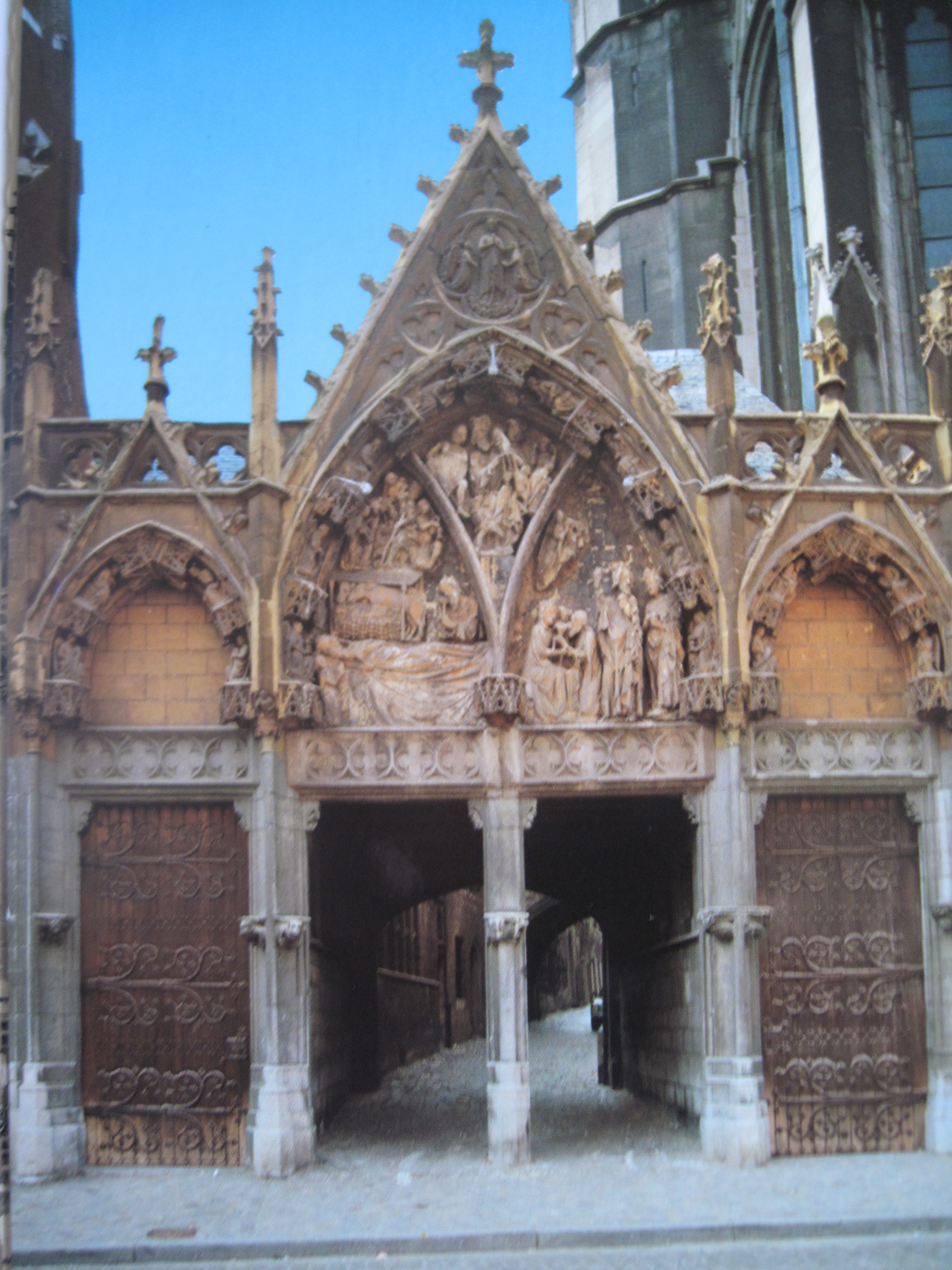 Le Portail du Bethléem de Huy avant sa restauration